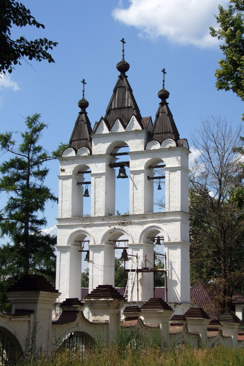 Усадьба Вяземы. Звонница Преображенского собора.